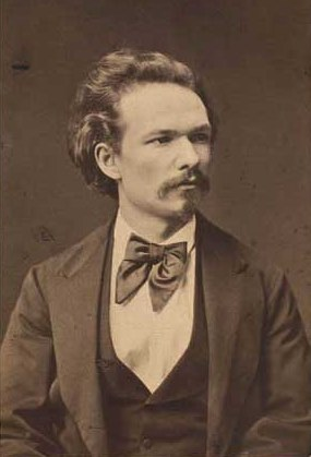 Oluf August Hermansen (O.A. Hermansen) (1849-1897), Danish painter